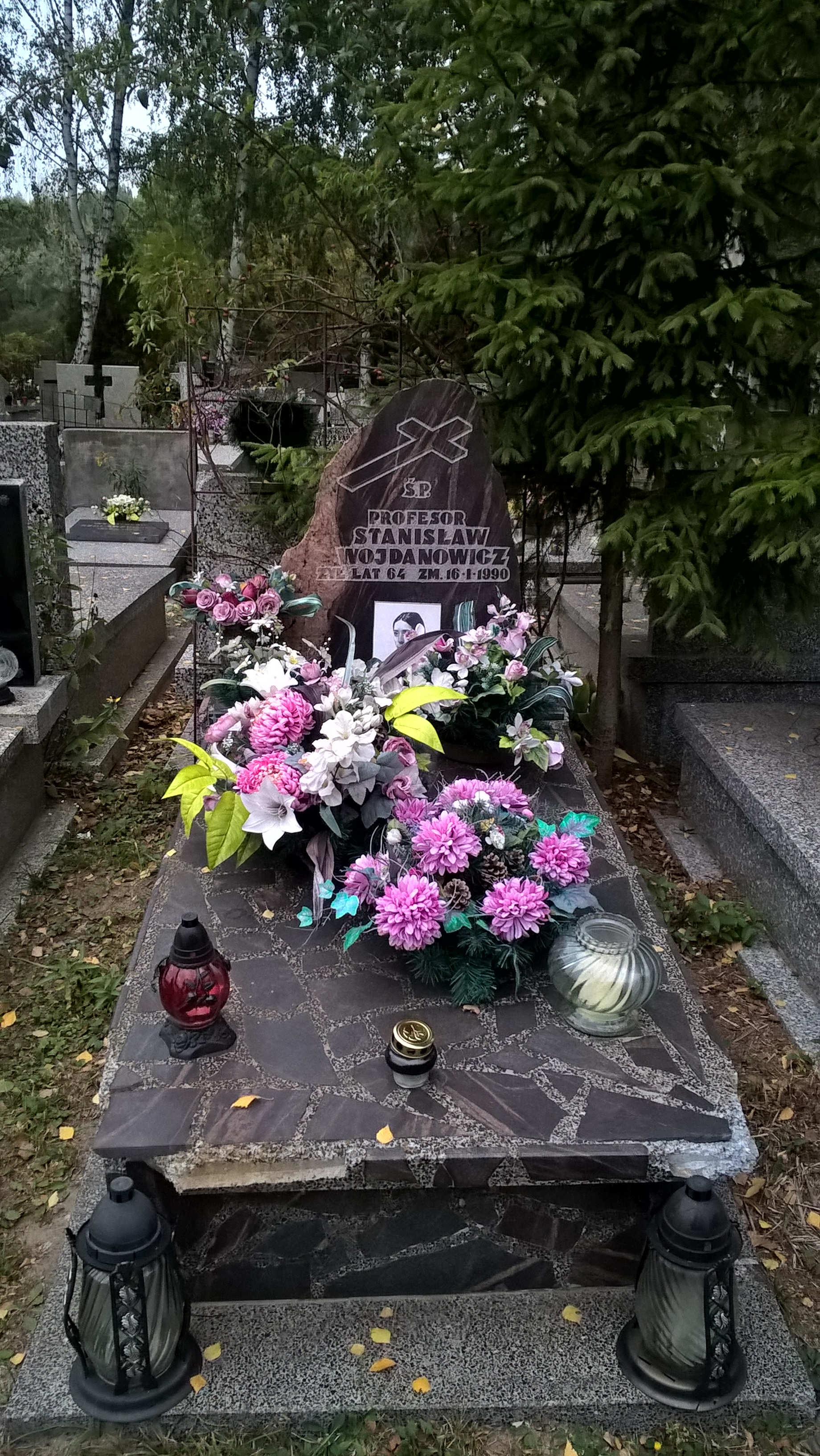 Grób prof. Stanisława Wojdanowicza, profesora PW, Cmentarz Komunalny Północny w Warszawie